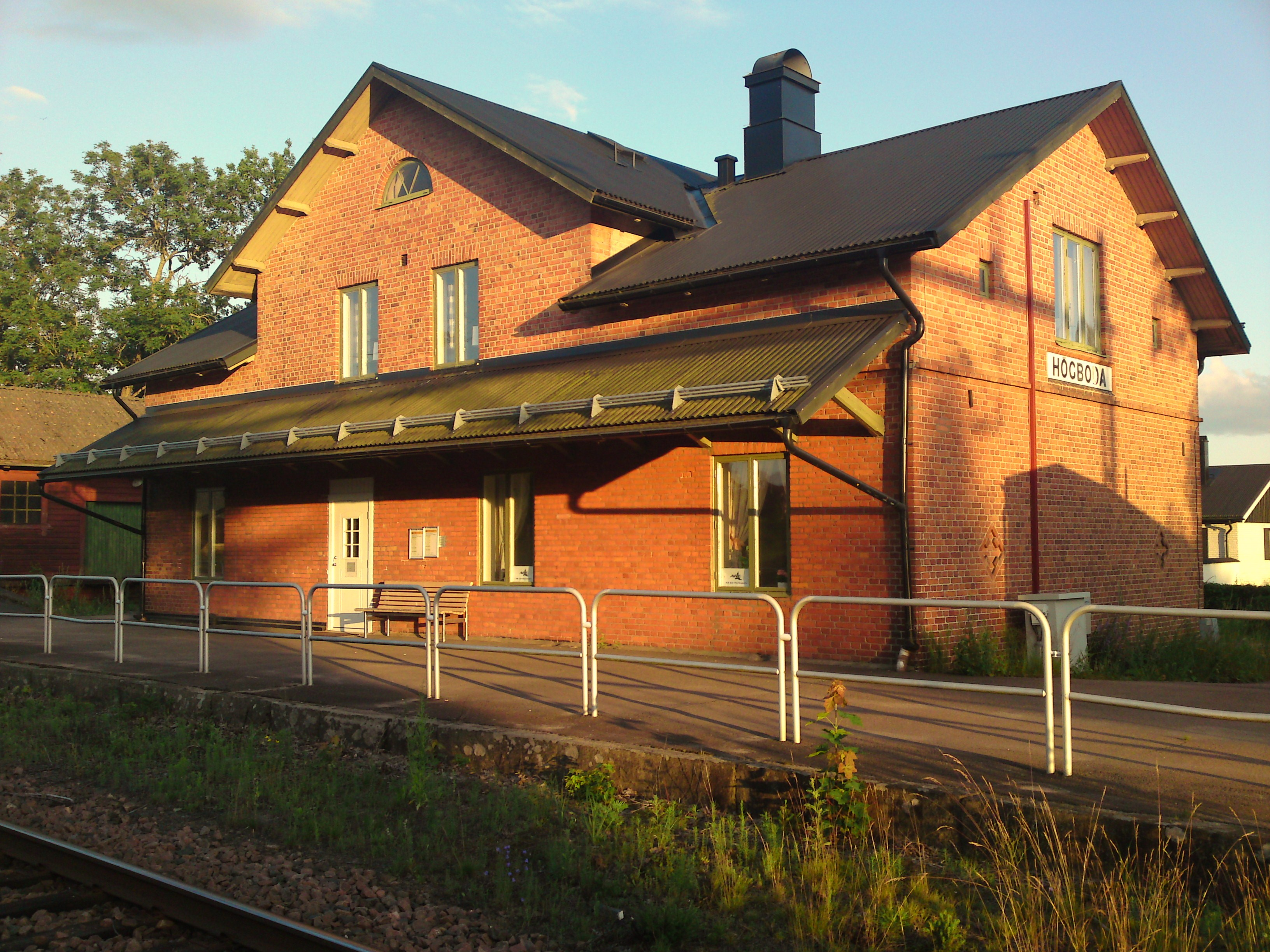 Högboda järnvägsstation på kvällen sommaren 2009